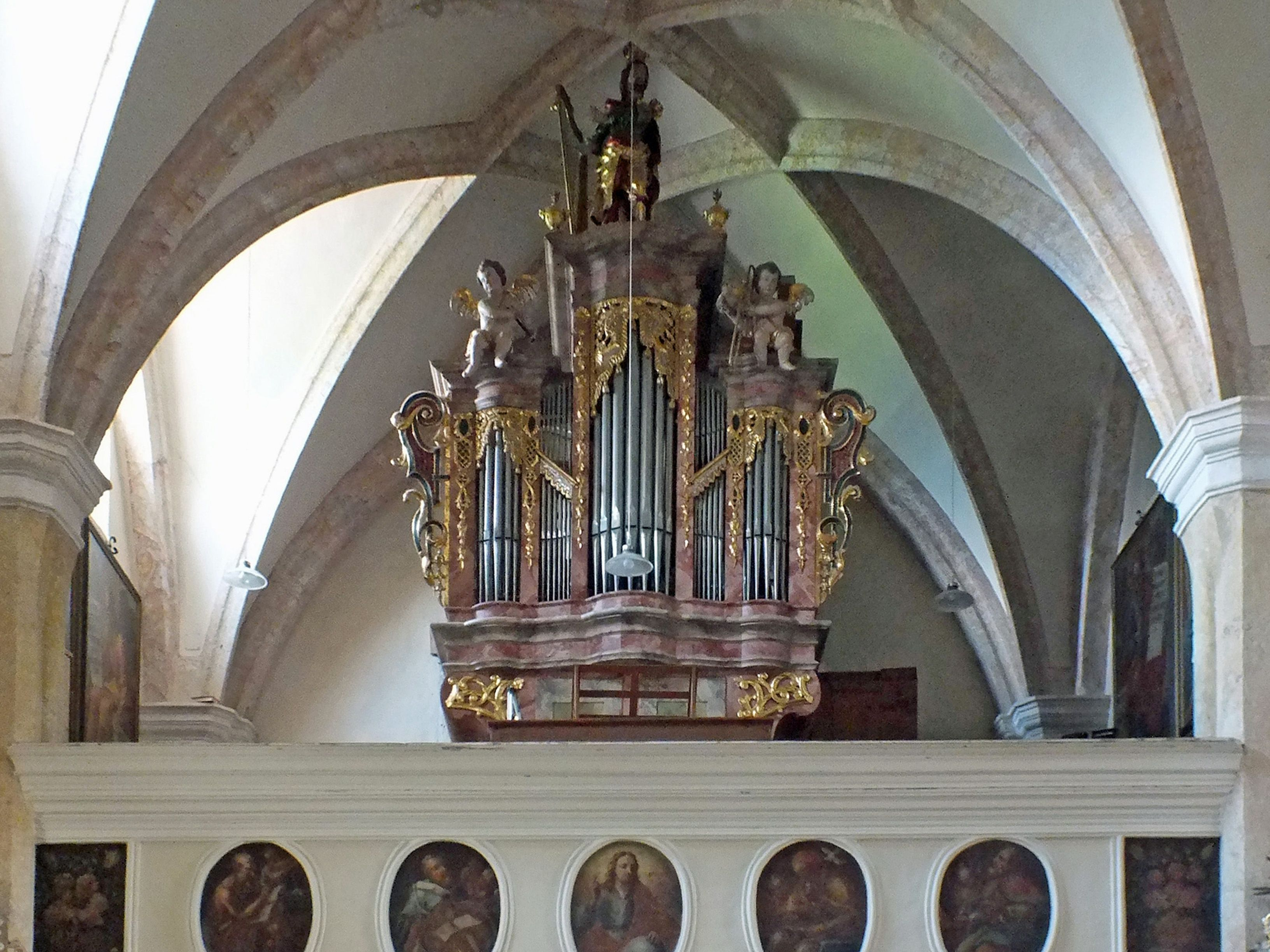 Orgel in der Kirche St. Georg in Pürgg, Steiermark